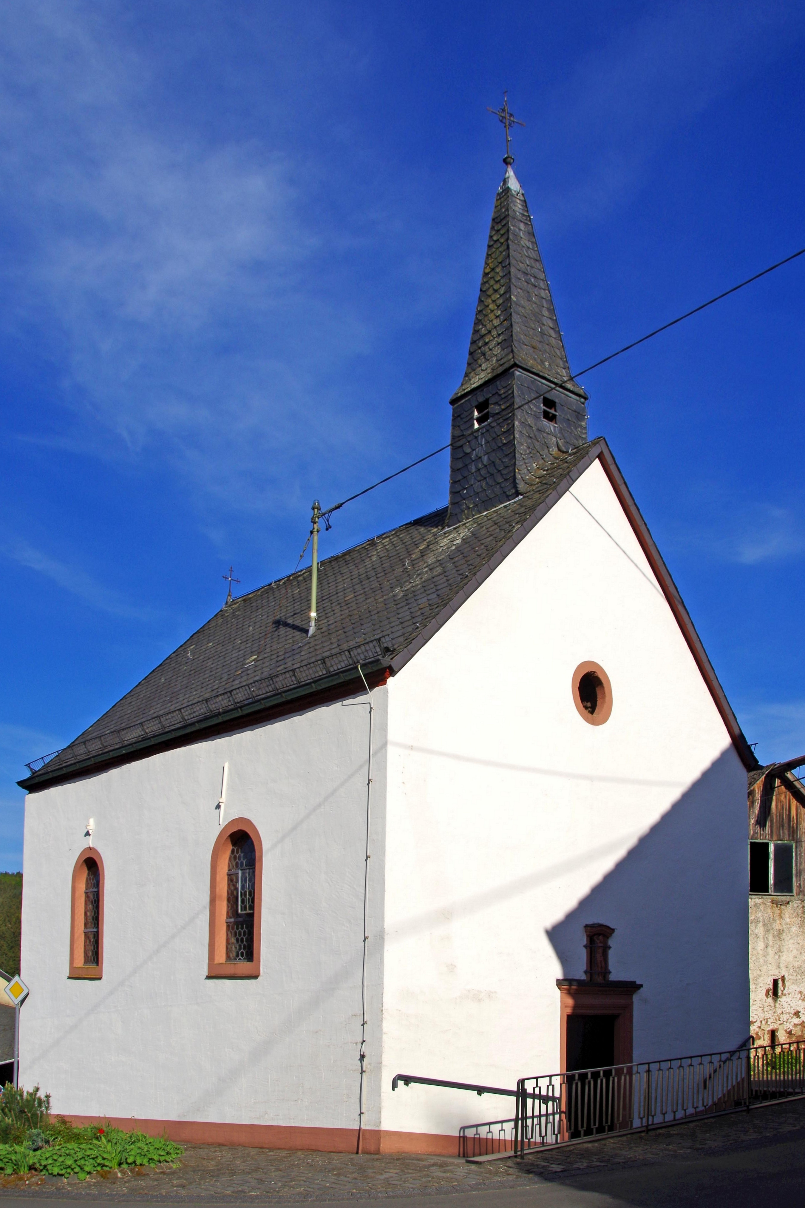 St. Walburga (Usch), Westseite